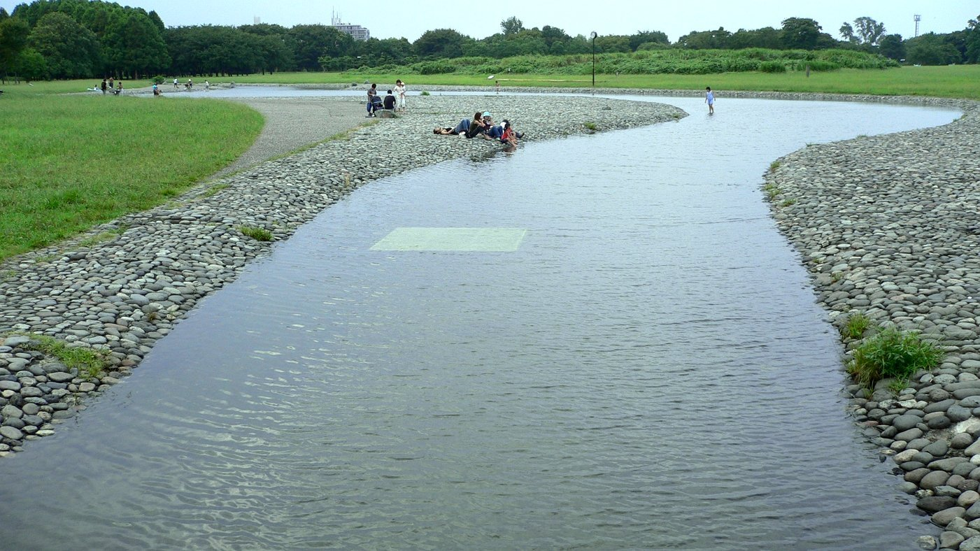 水深浅く水浴びに最適